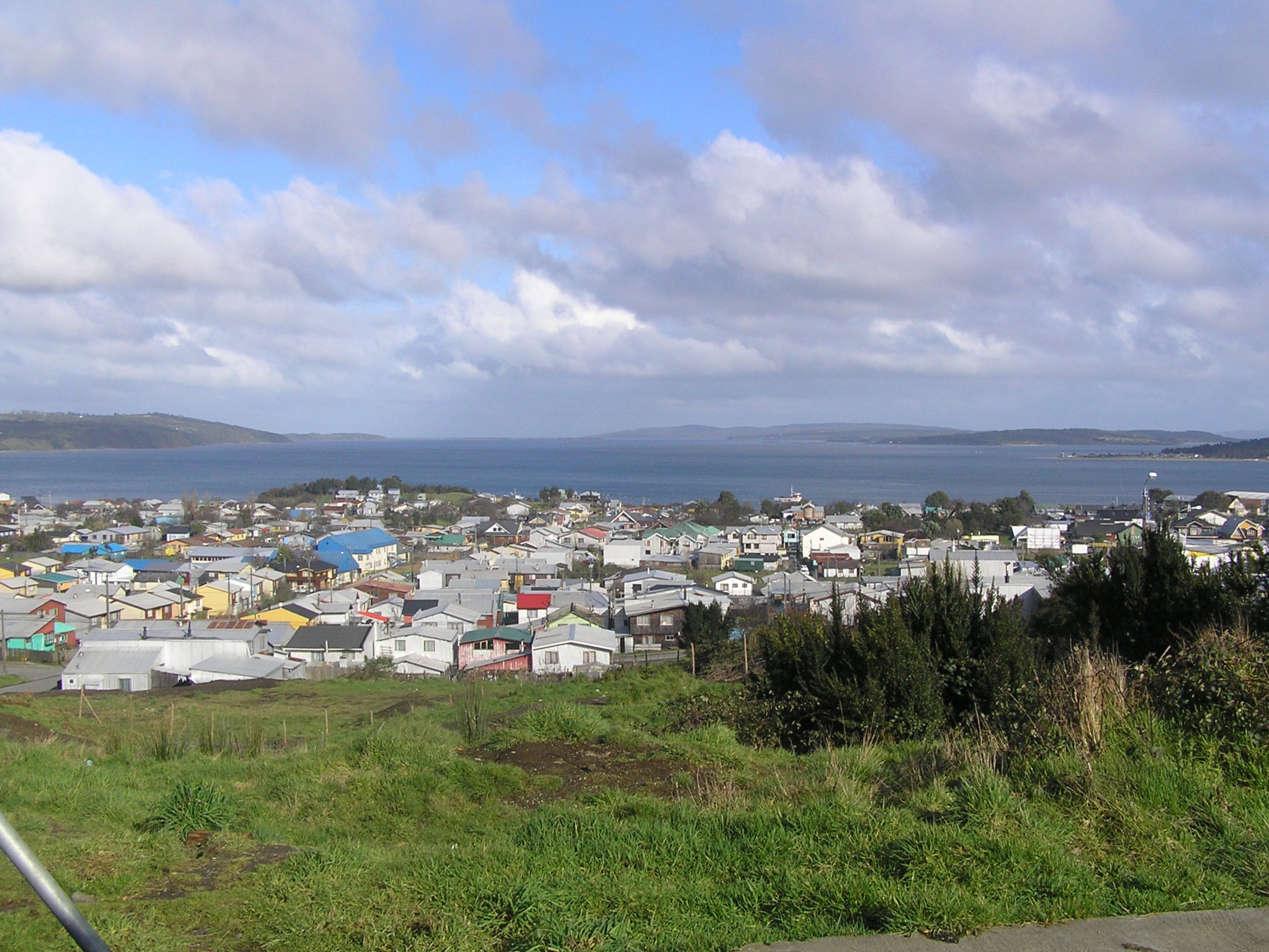 Quellon